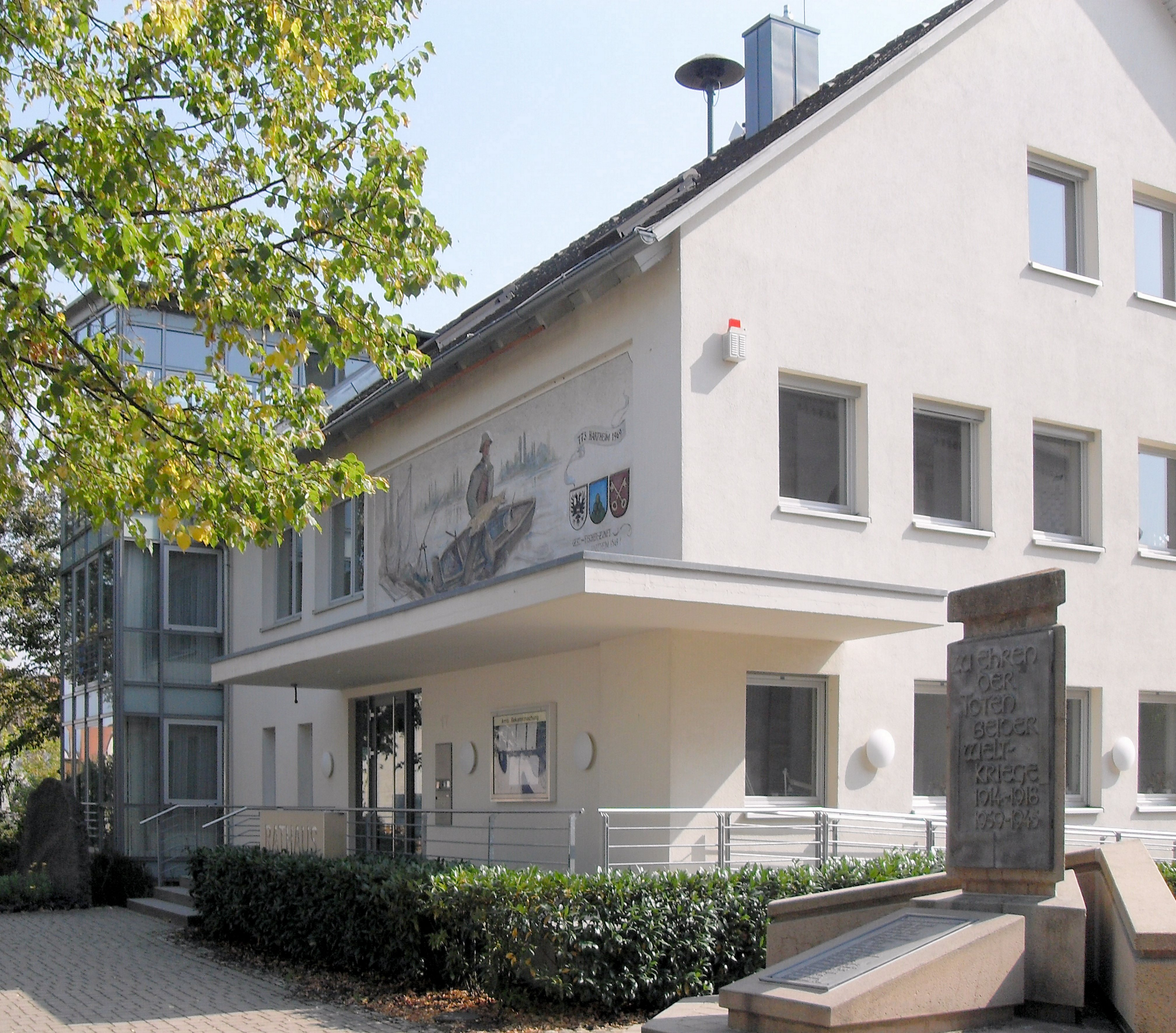 Rathaus in Hartheim am Rhein